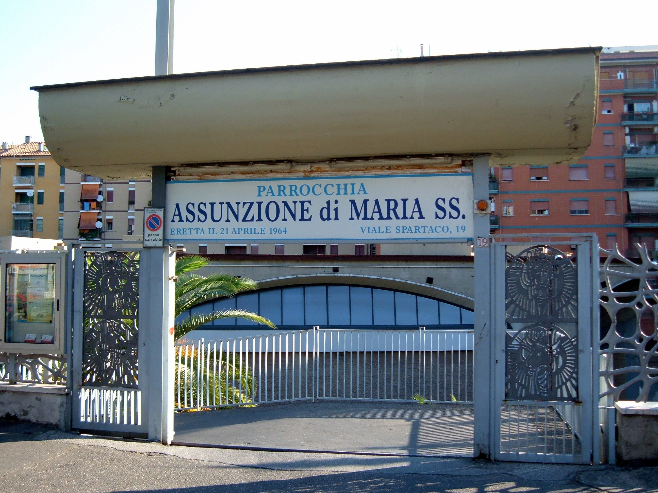 Chiesa dell'Assunzione di Maria, a Roma, nel quartiere Tuscolano.